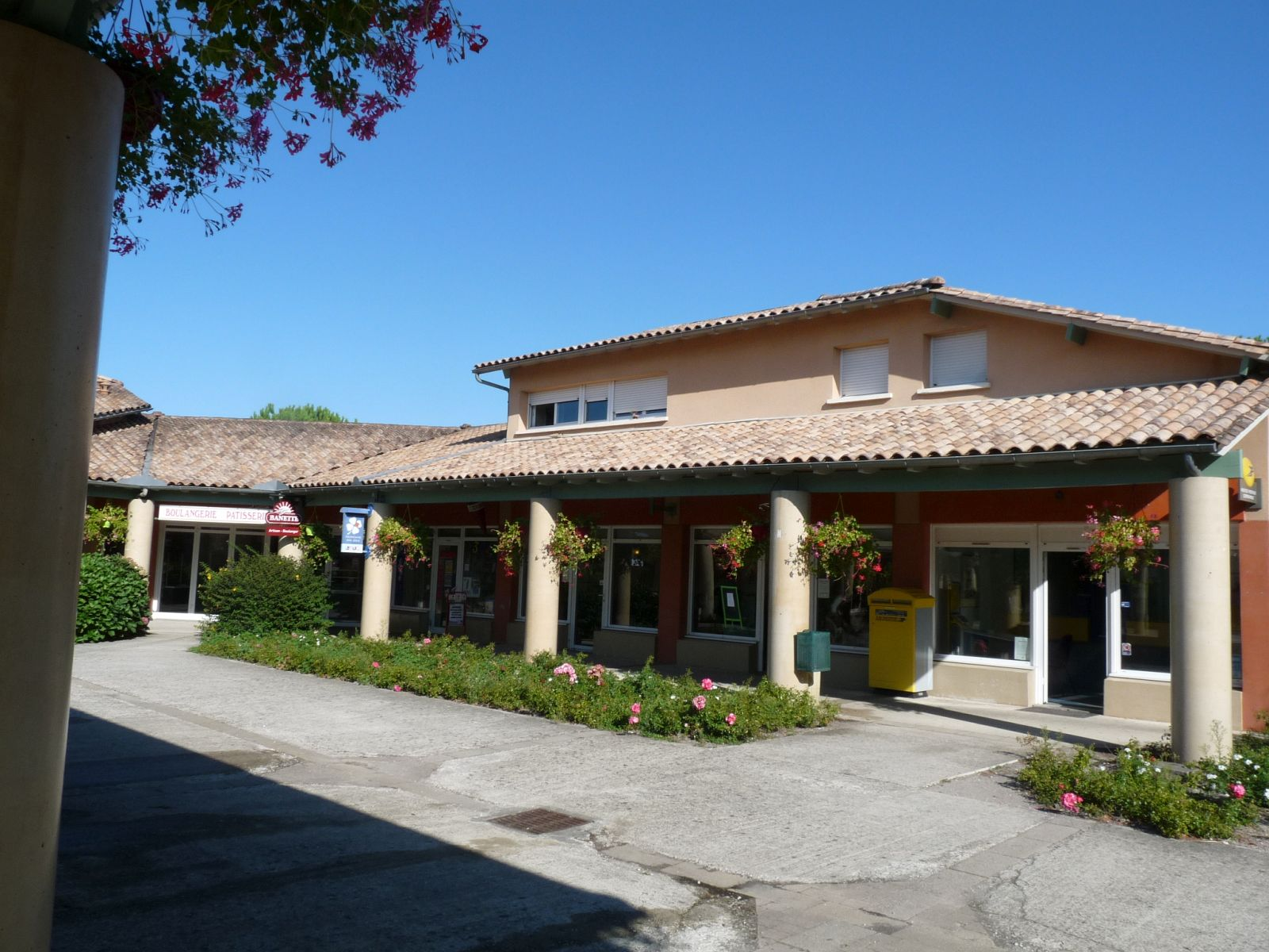 Centre commercial, place de l'hôtel de ville, Peujard, Gironde, France